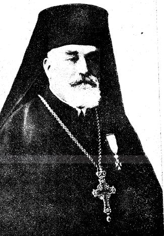 Αγαθάγγελος Ξηρουχάκης (1872 - 1958), λόγιος και Επίσκοπος Κυδωνίας και Αποκορώνου, υπουργός Γενικός Διοικητής Κρήτης to 1945